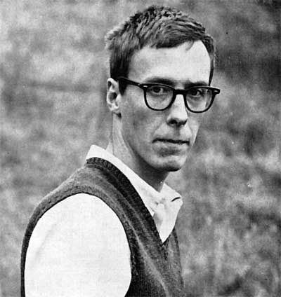 Lars Görling